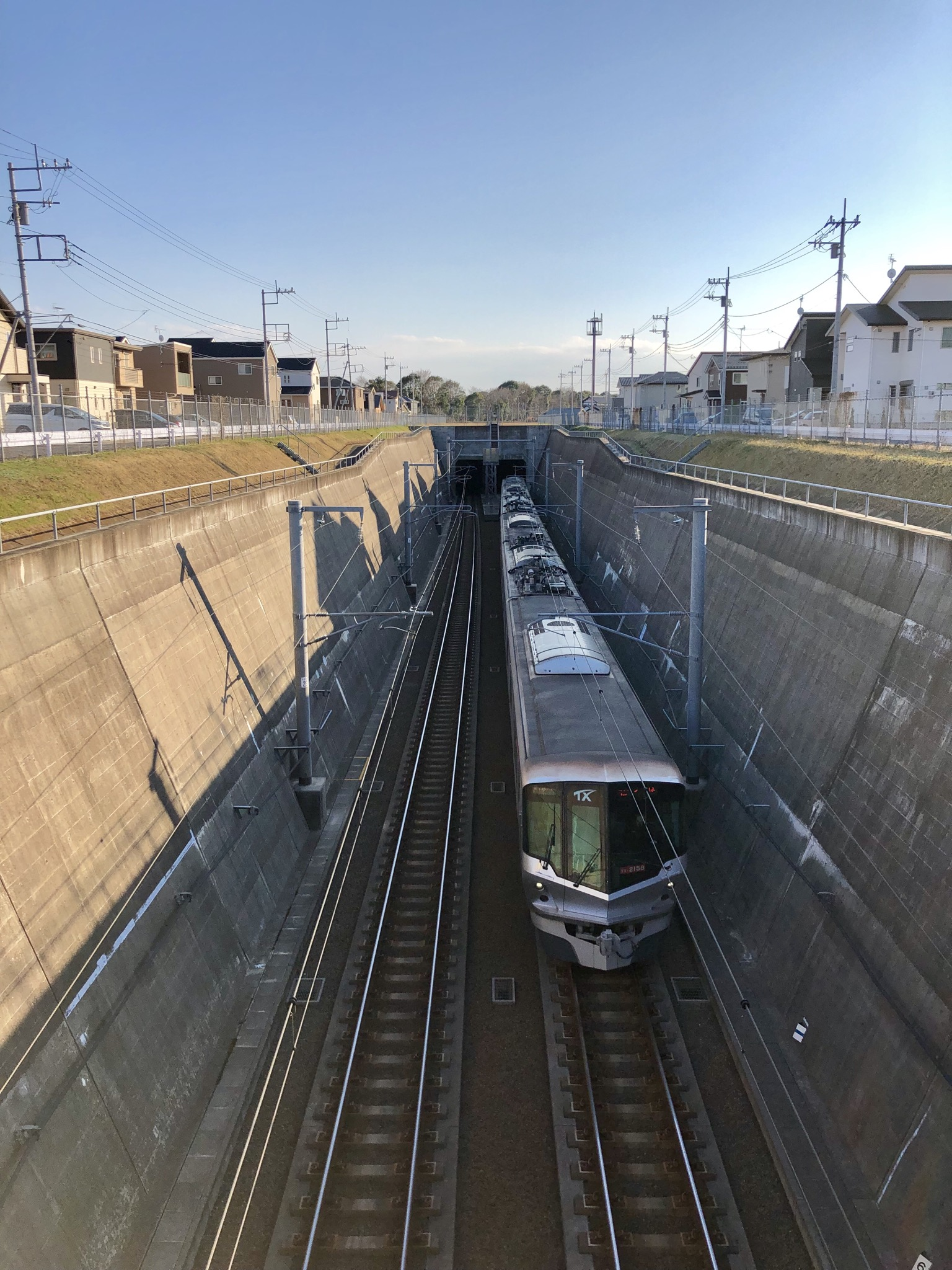 常磐道トンネルを出てみどりの南地区を走行するTX-2000系電車。